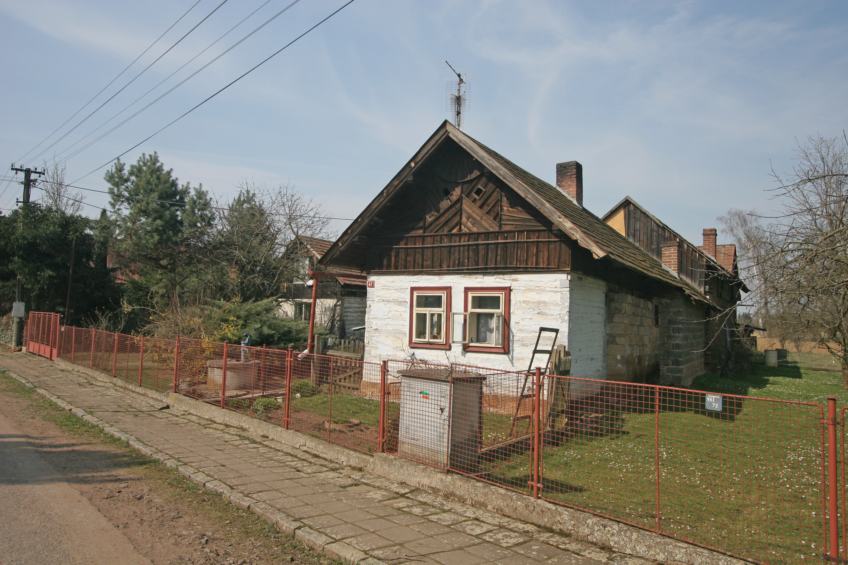 Staré Smrkovice čp. 47